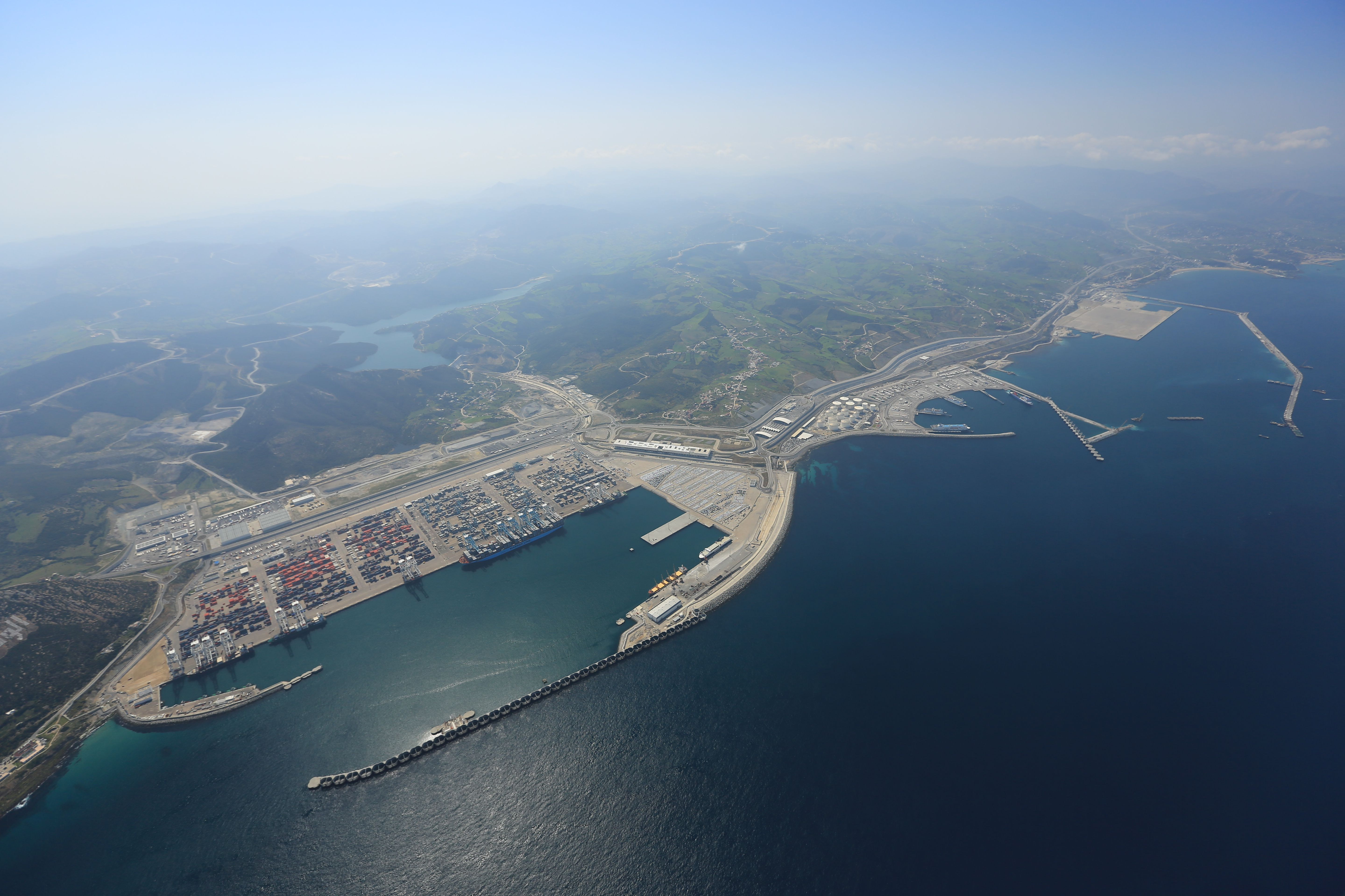 vue aérienne du complexe portuaire Tanger Med